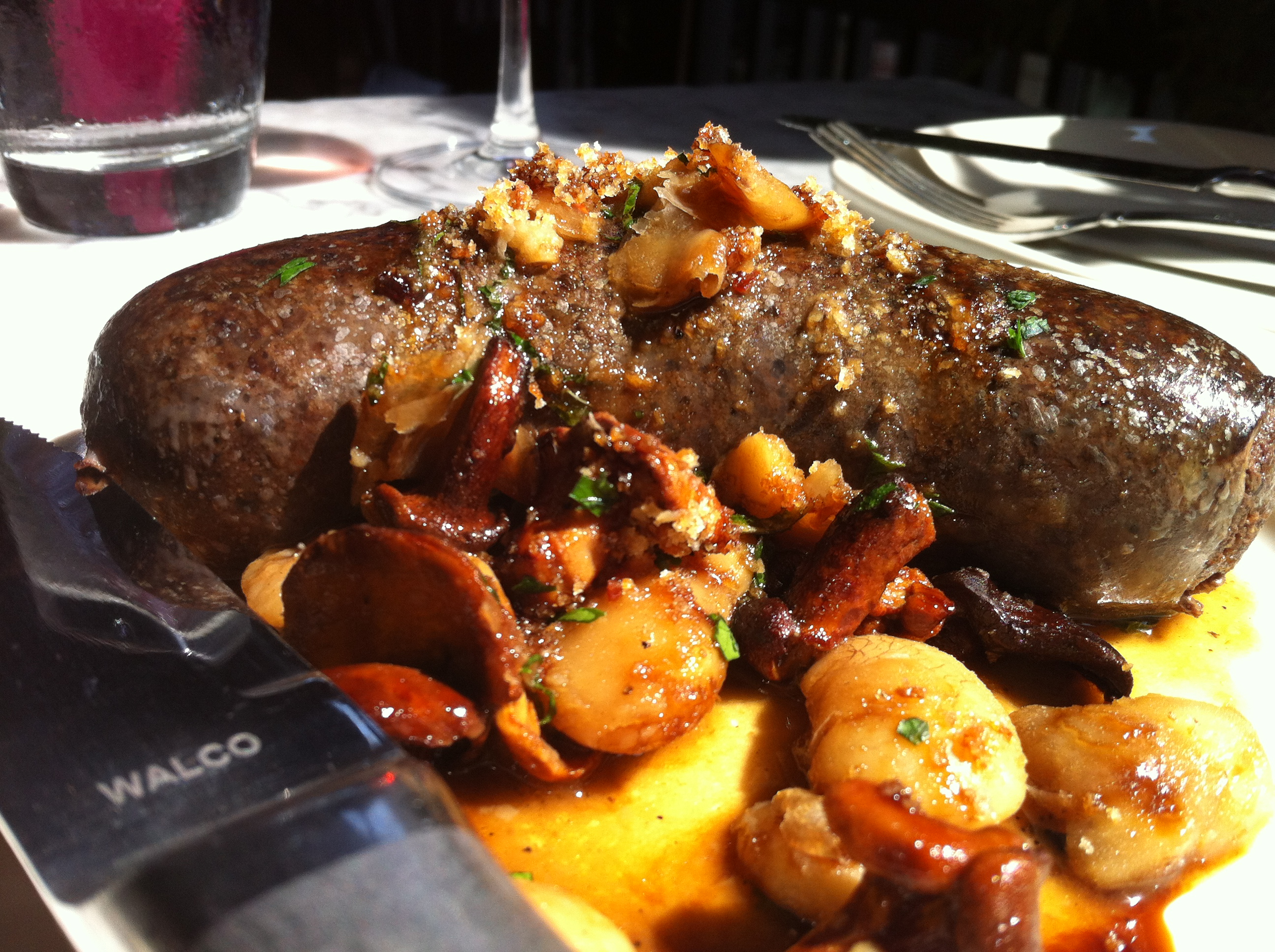 Morcilla